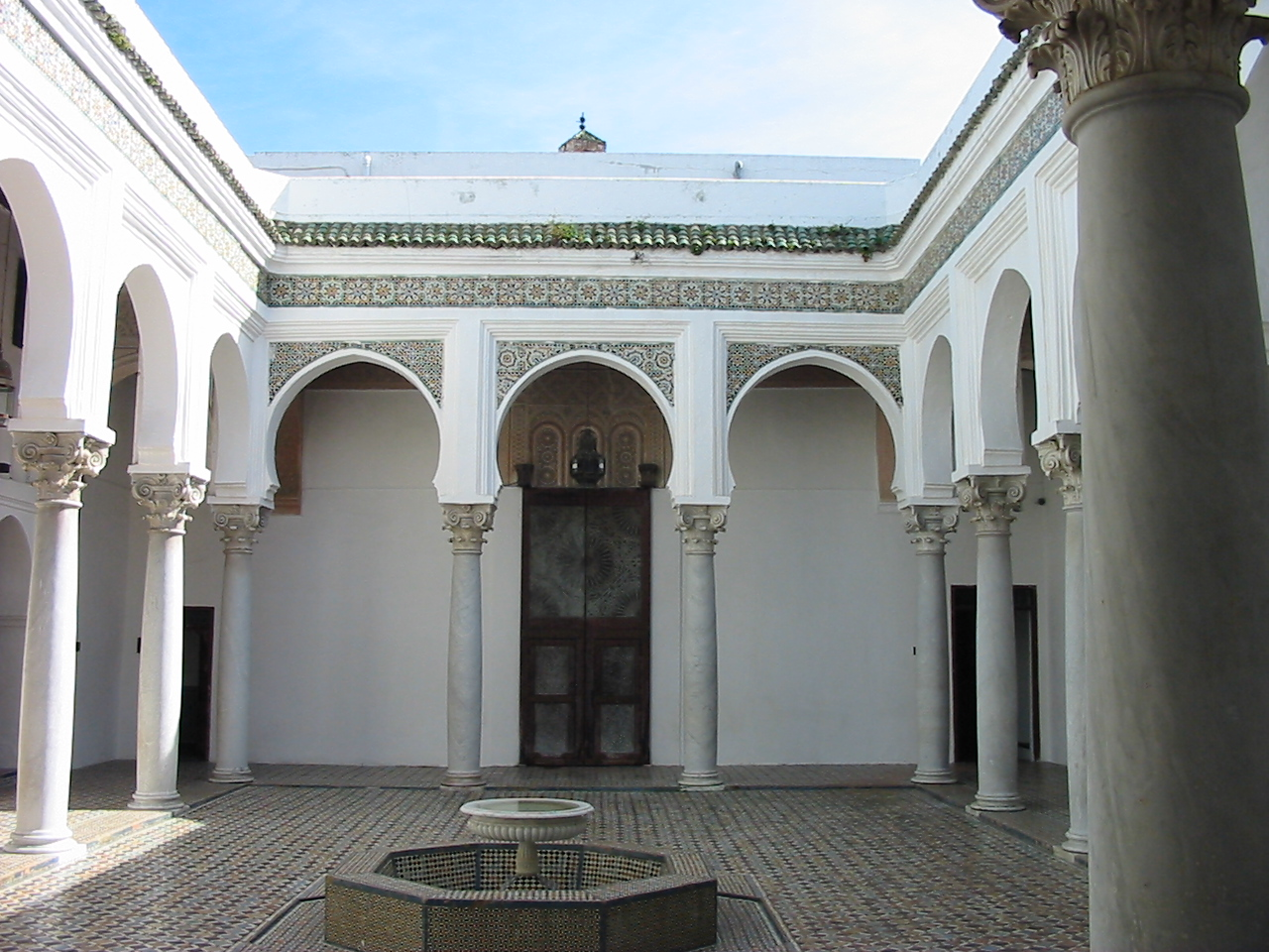 Intérieur du Palais du Sultan dans la Kasbah de Tanger